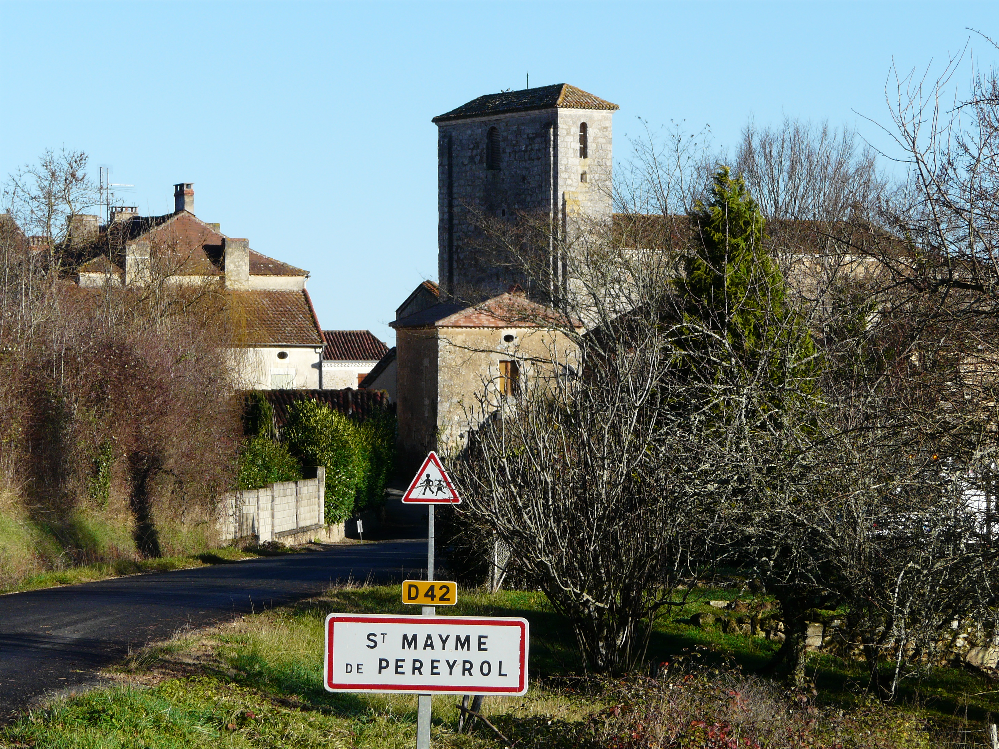 Le village de Saint-Maime-de-Péreyrol, Dordogne, France.